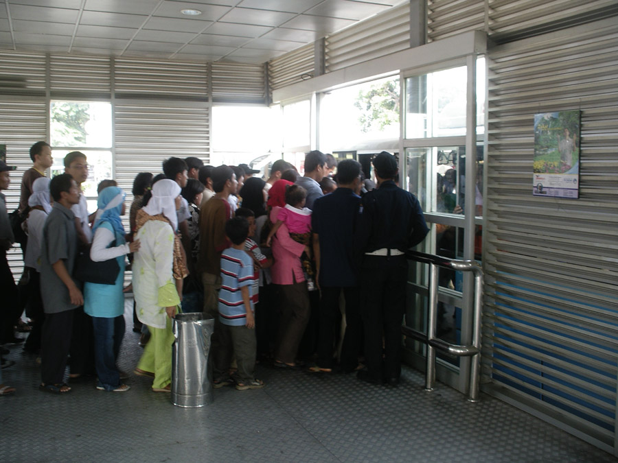 Während der Hauptverkehrszeiten kommt es an den Eingängen zu den Bussen zu starkem Gedränge.